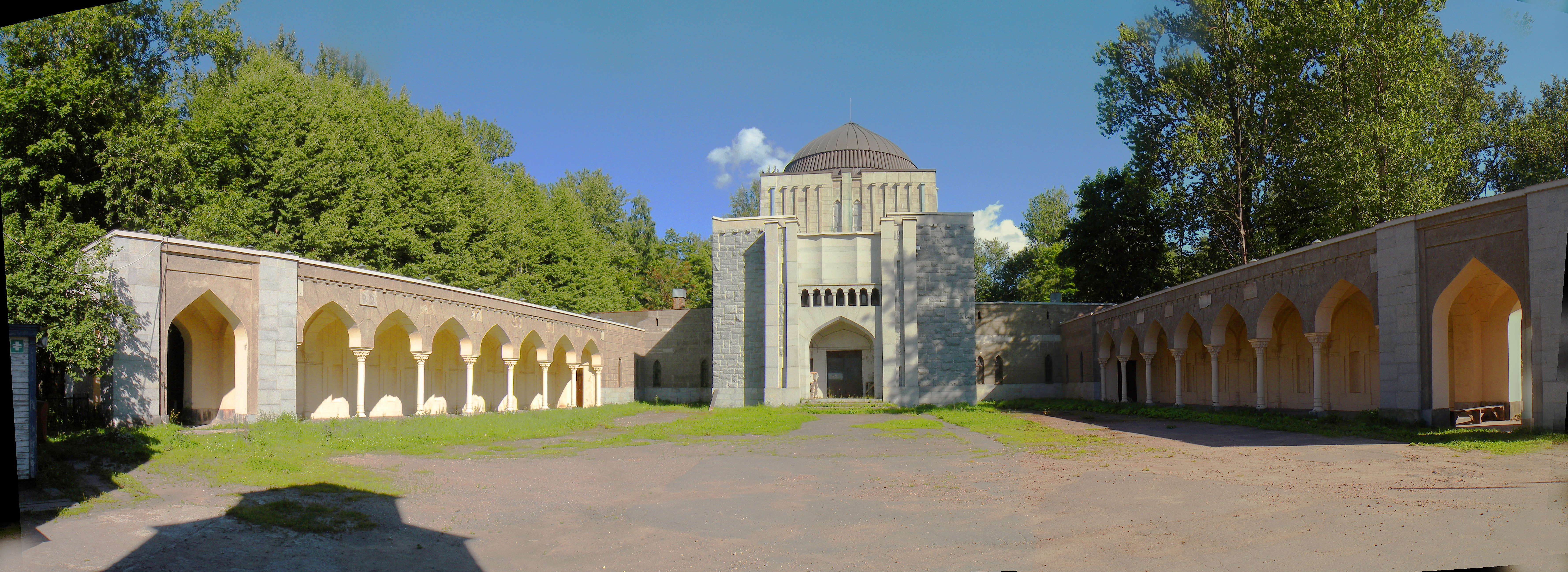 Дом омовения и отпевания